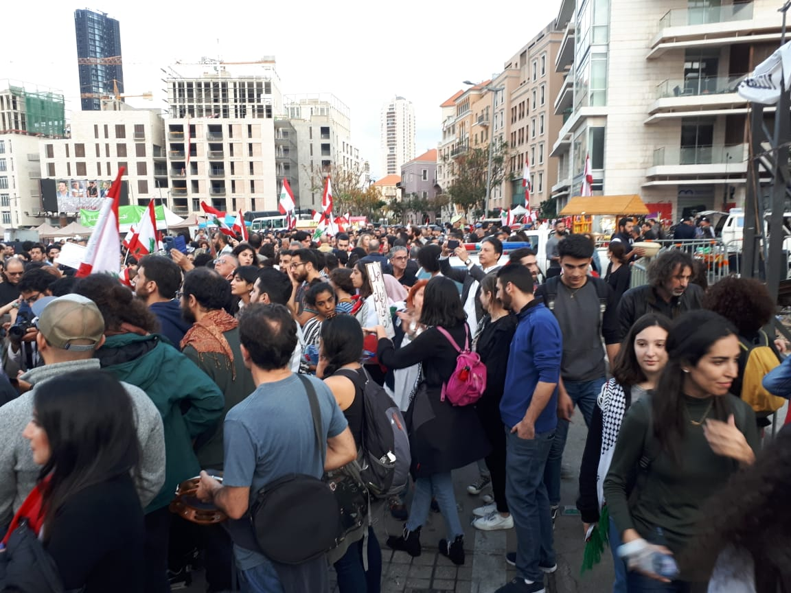 Proteste auf dem Beiruter Märtyrerplatz